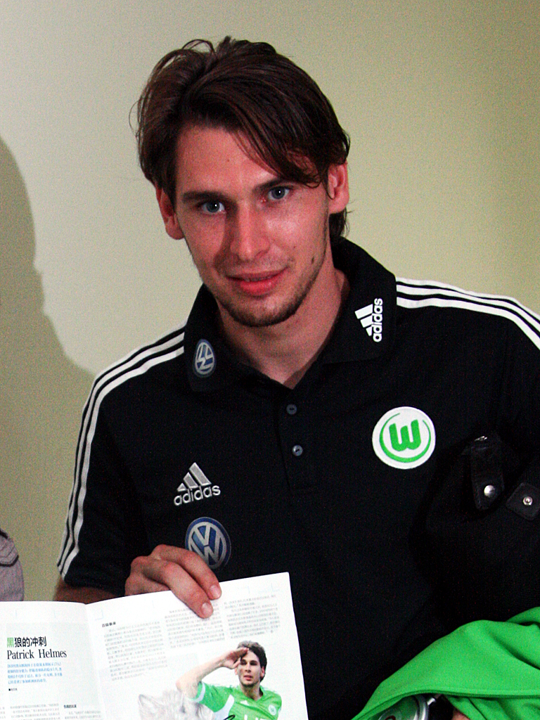 帕特里克·黑尔默斯于中国广州